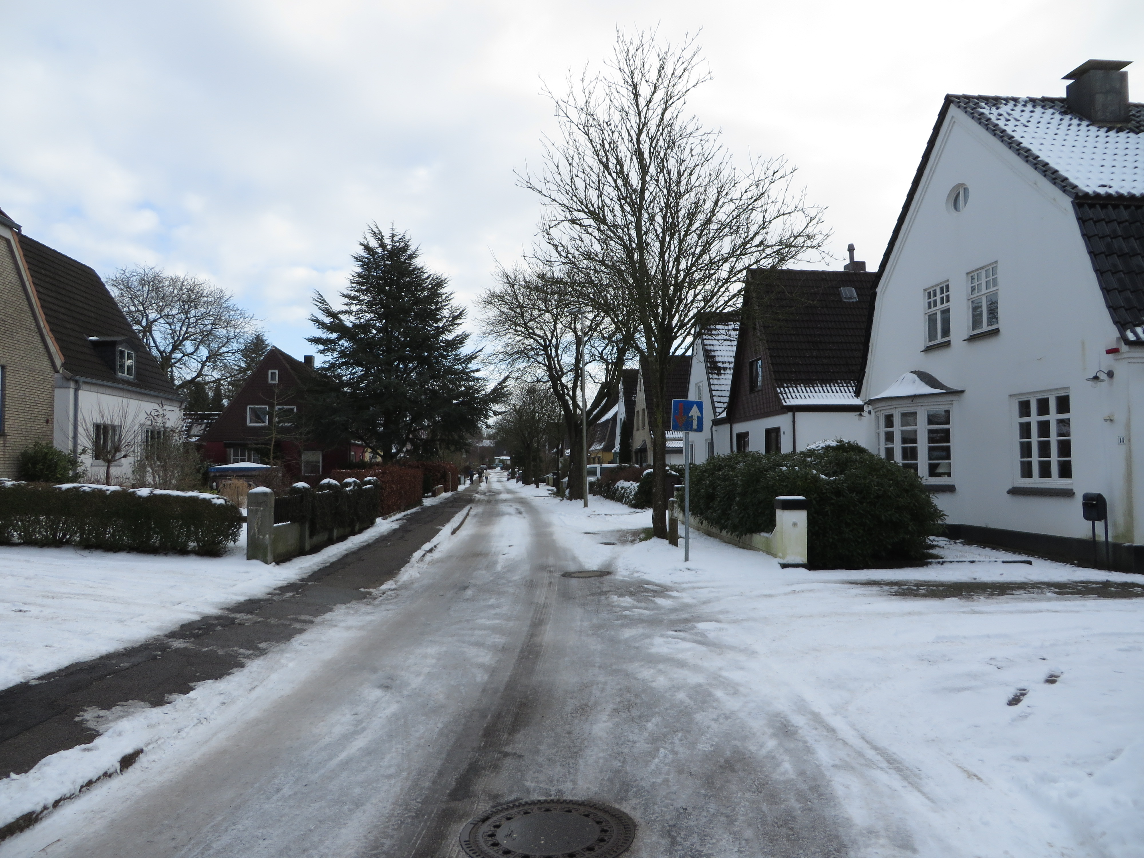 Straße Bohlberg (Flensburg-Fruerlund Jan 2015), Bild 02